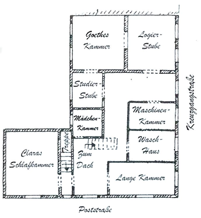 Kreuzgangstraße 5 Grundriss Obergeschoss 1840er